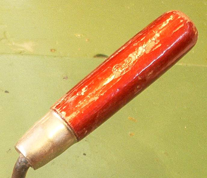 zelfgemaakte afbeelding van eigen foto van troffel. Martink.